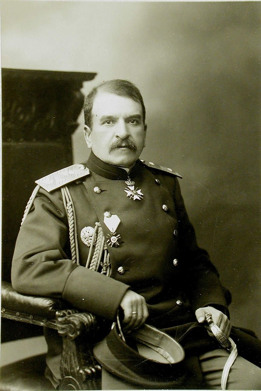 Радко-Дмитриев, Радко Дмитриевич